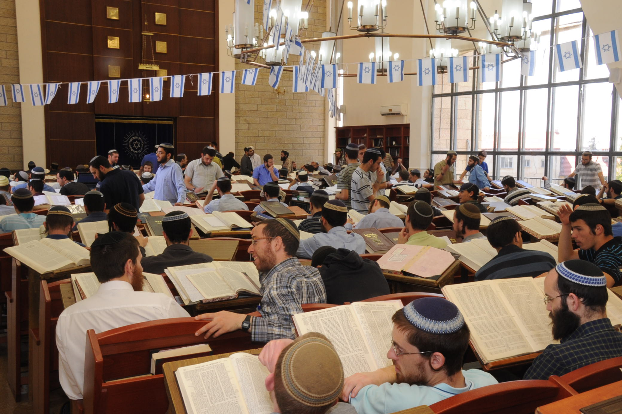 ישיבת מרכז הרב.